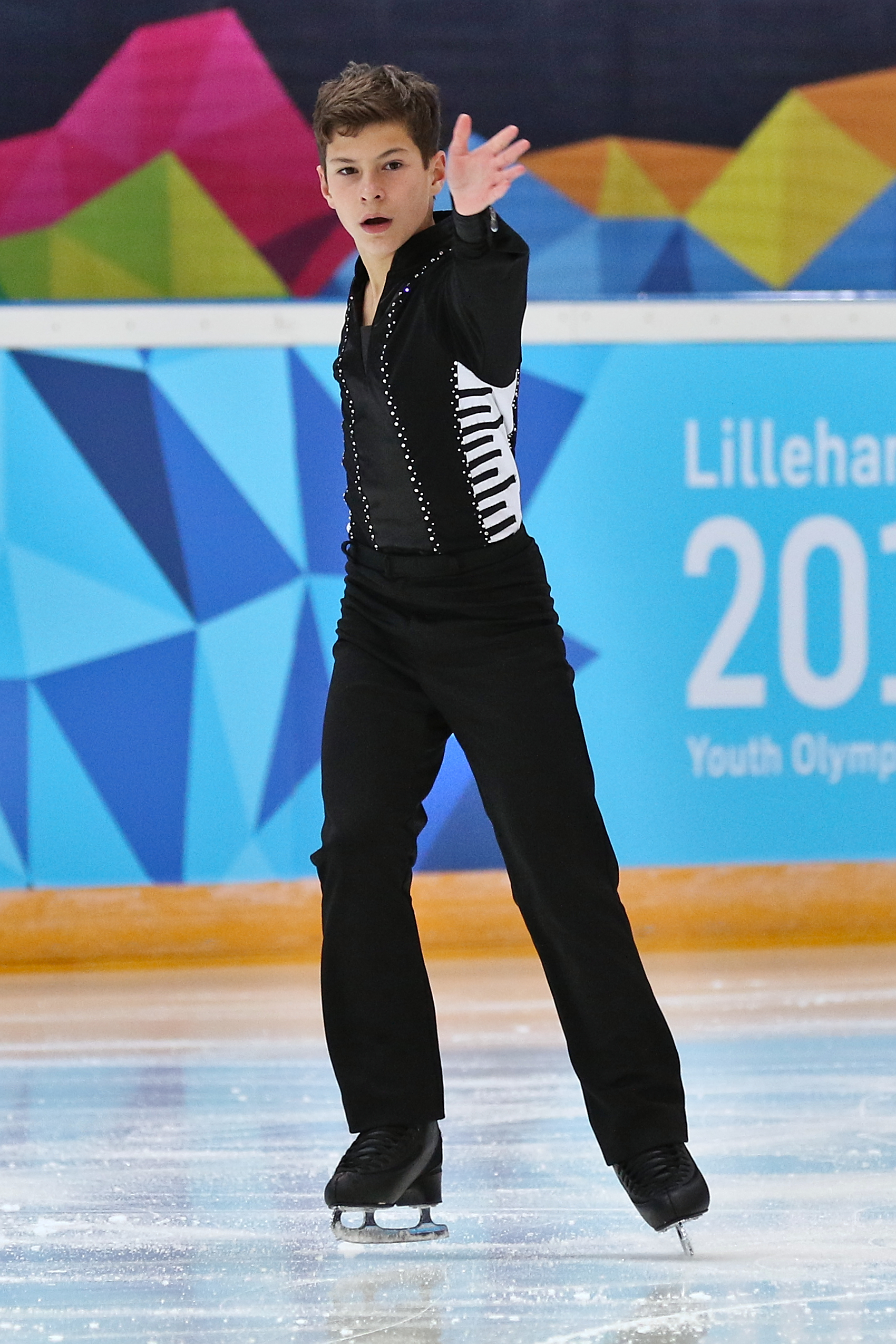 Lillehammer 2016 - Figure Skating Men Short Program - Mark Gorodnitsky